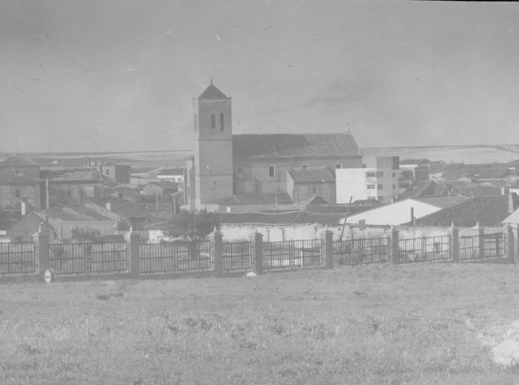 Iglesia - La Seca (Valladolid) - Álbum 200 x 140 - Fotografía. Papel 120 x 90 B/N